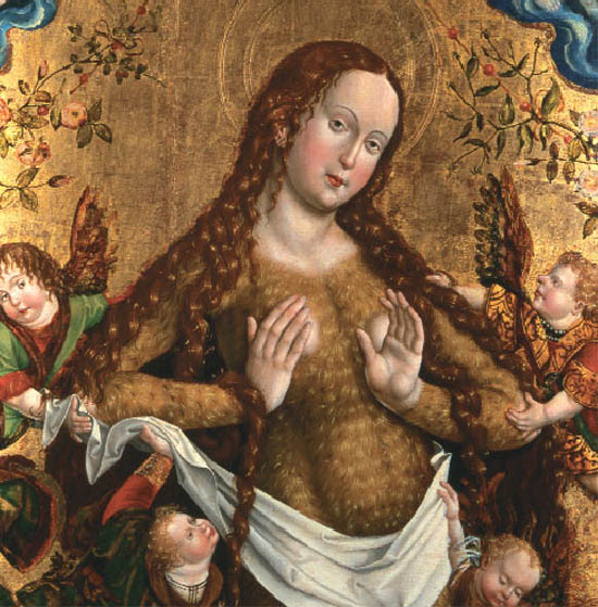 Ascension of Mary Magdalene/ Der Münchner Maler Jan Polack hat um 1500 diese Erhebung in den Himmel zum Thema eines Altarbilds gemacht.